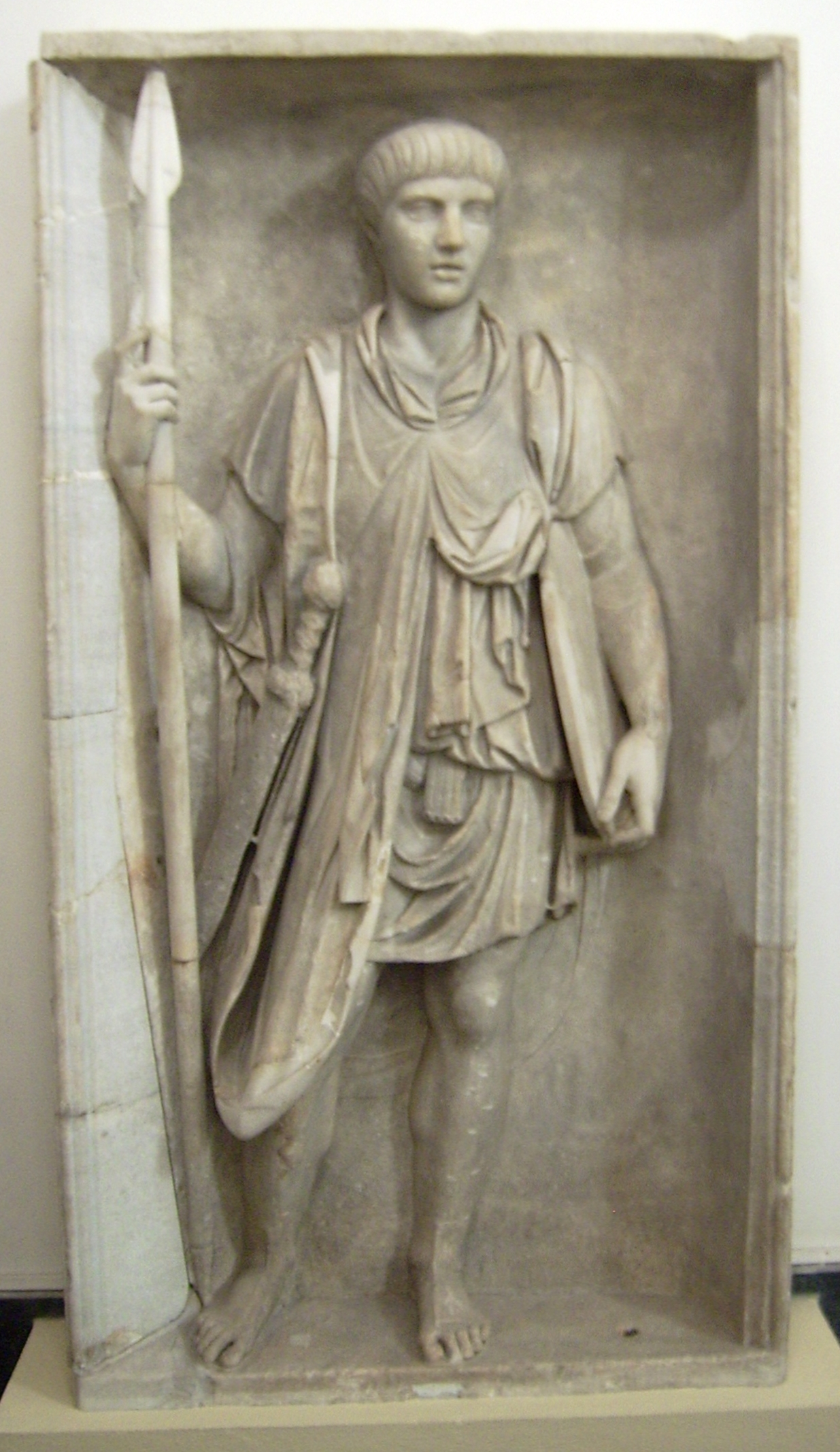 Relief mit der Darstellung eines römischen Legionärs, Römisch, Ende des 1. Jh., um 1800 in Puzzuoli gefunden, für die Antikensammlung Berlin 1830 in Rom erworben, weißer bis graubläulicher Marmor, 159 cm hoch und 86 cm breit, Sk 887